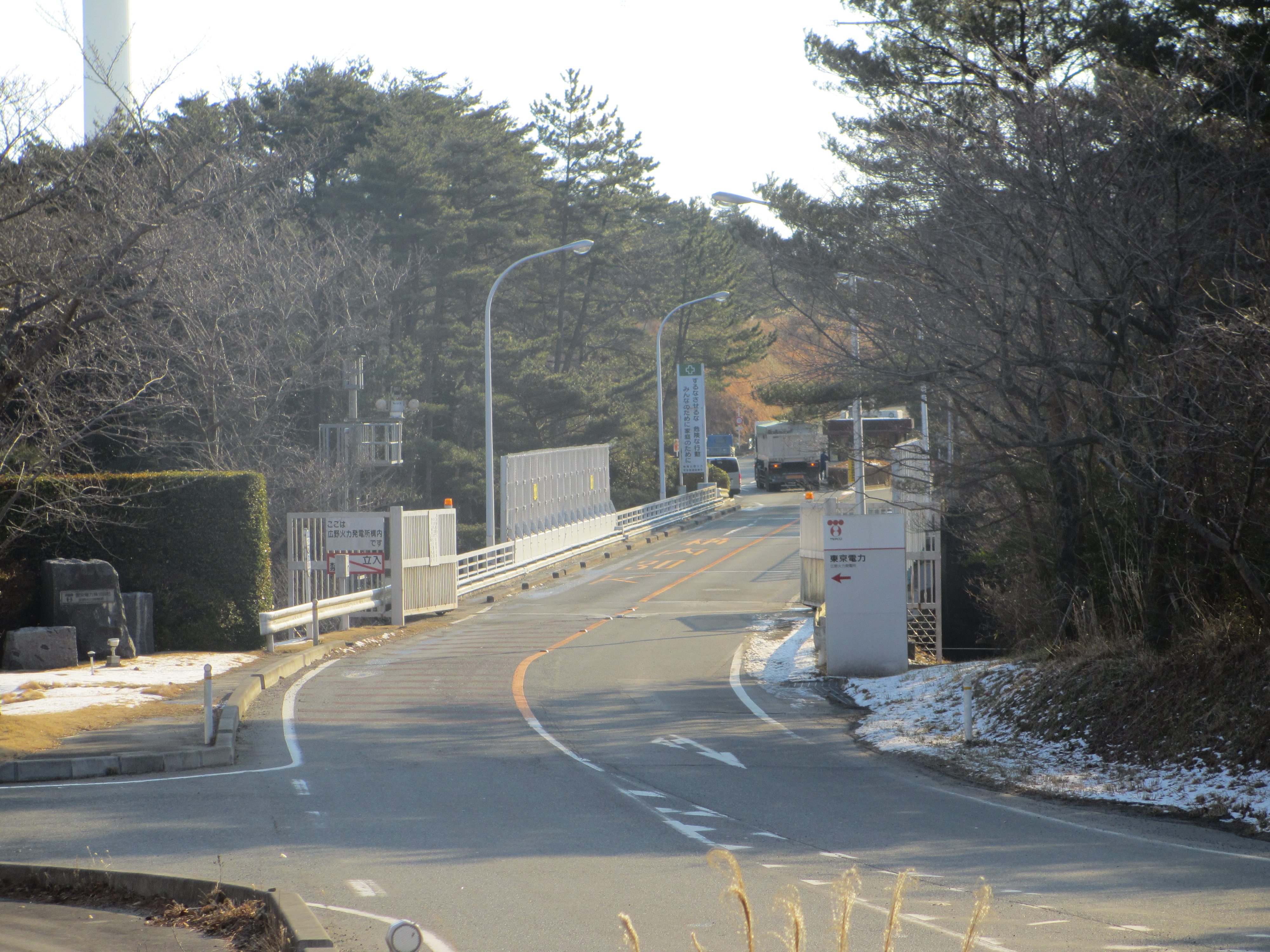 広野火力発電所の入り口